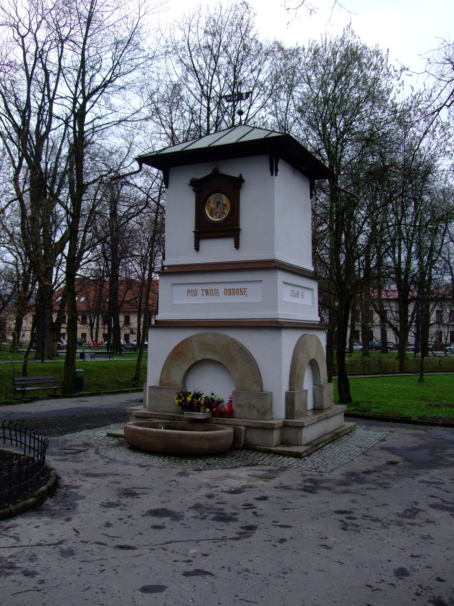 Kapliczka - pierwotnie zbiornik wody siarczkowej. Krzeszowice.